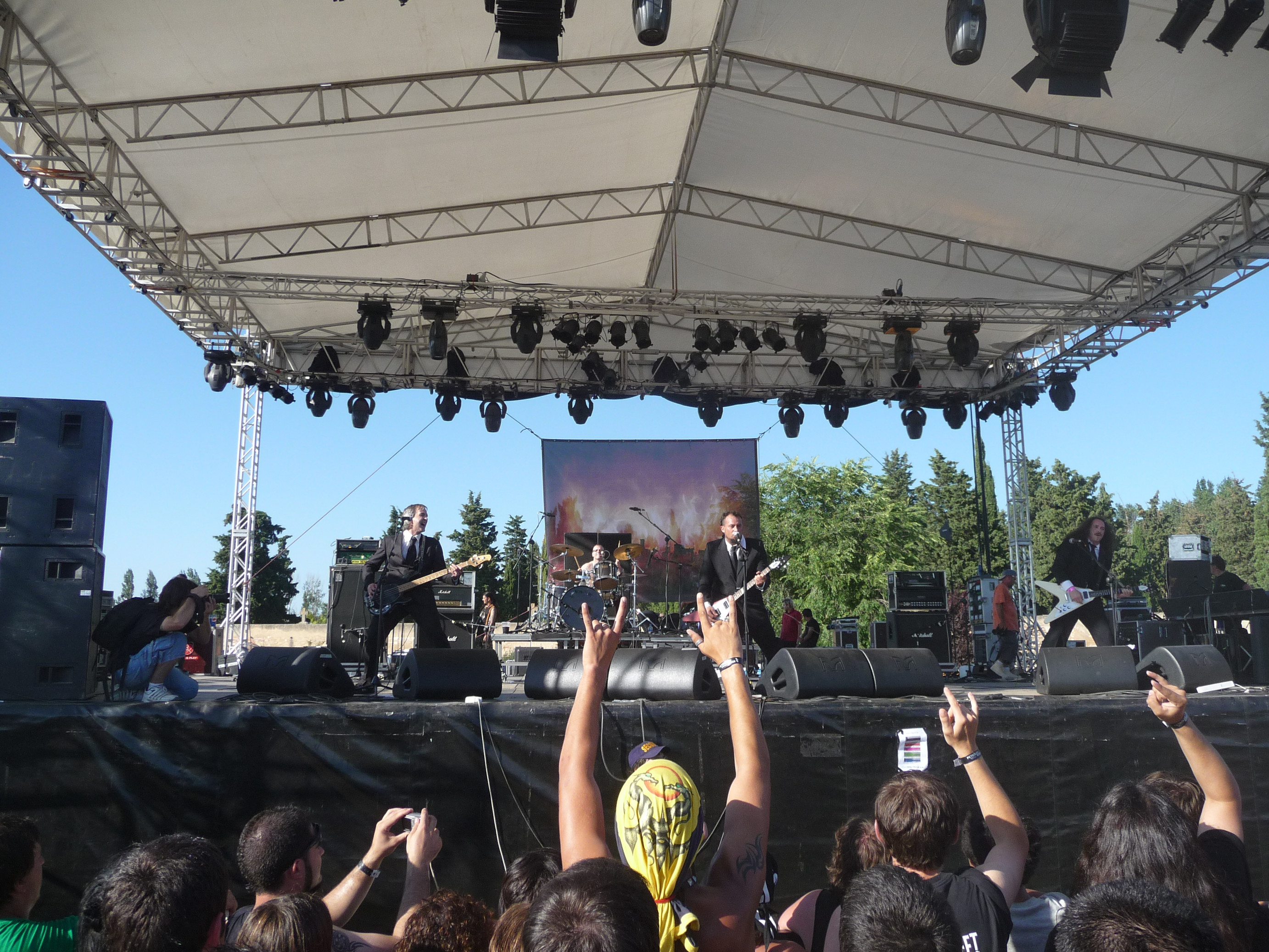 Koma en Petróleo Rock 2008. Miranda de Ebro.